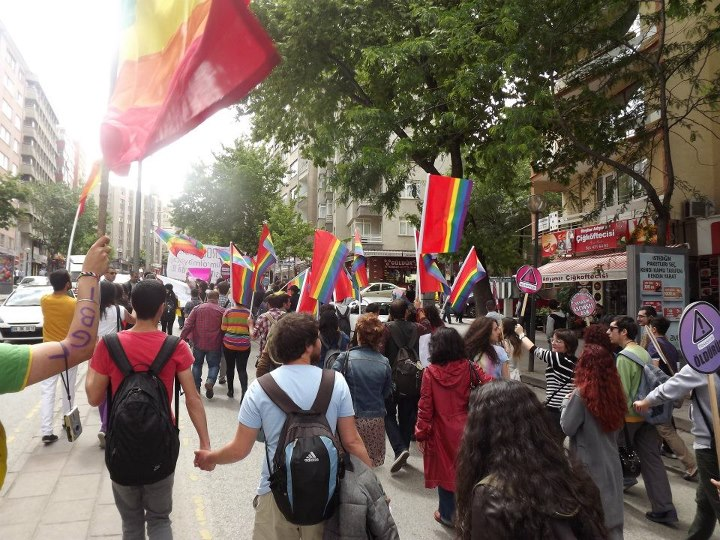 2012 Ankara Homofobi ve Transfobi Karşıtı Yürüyüşünden bir kare.